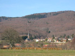 paysage de Rougemont le Château 90 avec massif des Vosges dans le fond Photo prise par LP90 le 16 mars 2004 Copyright licence GFDL LP90